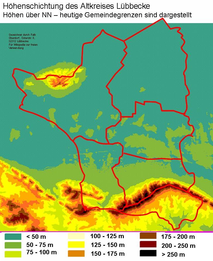 Physische Karte des Kreises Lübbecke